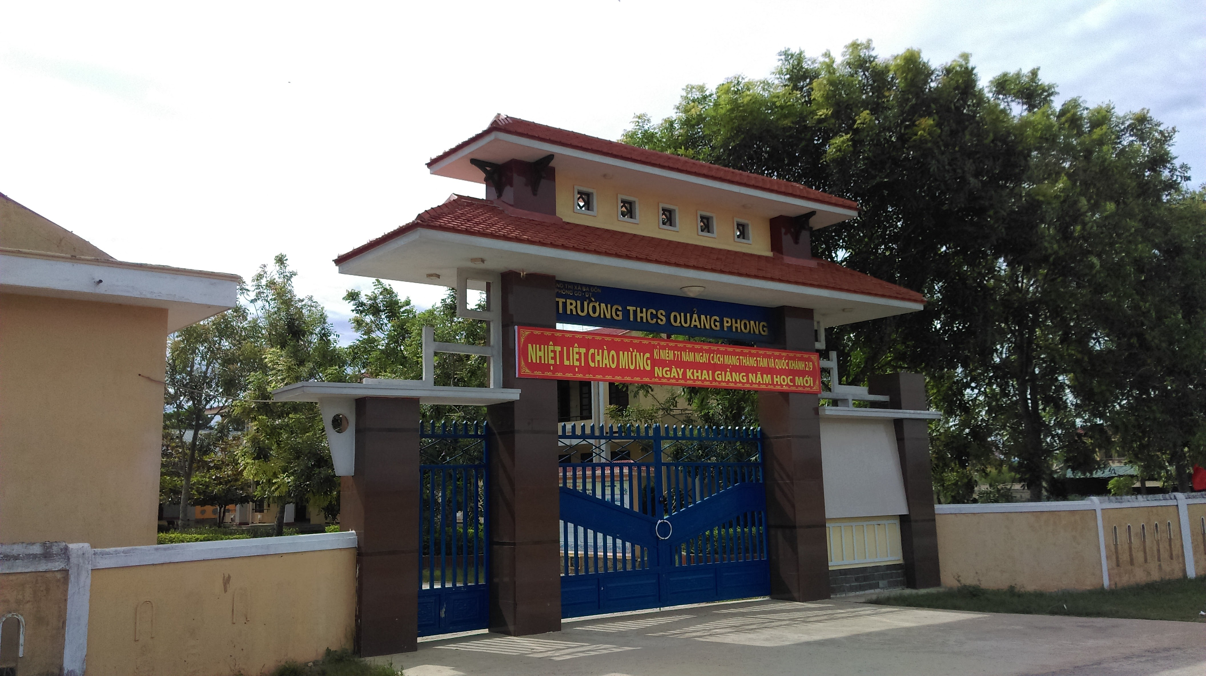 Trường THCS Quảng Phong, Ba Đồn, Quảng Bình